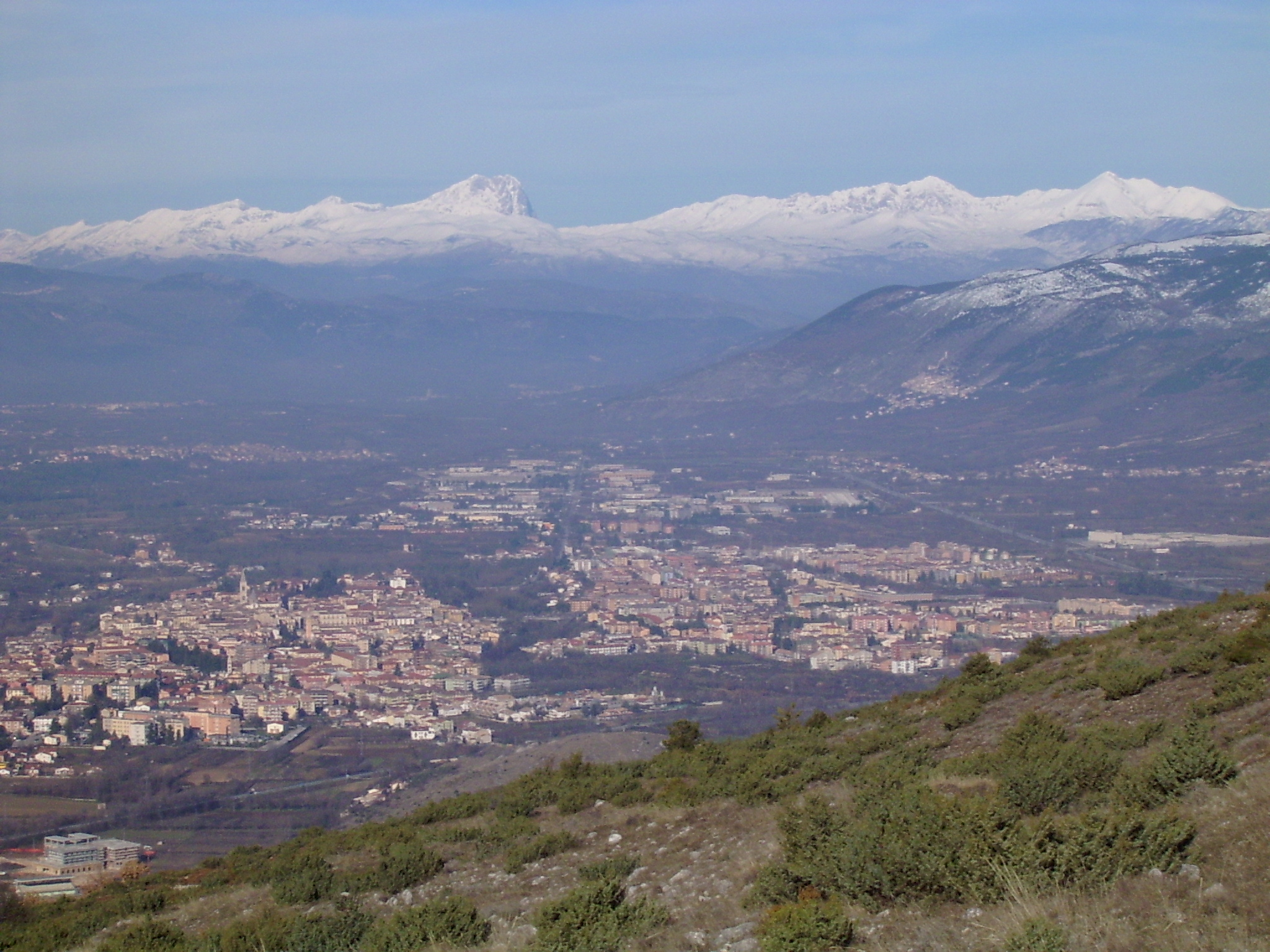 Panorama di Sulmona da Colle Mitra.